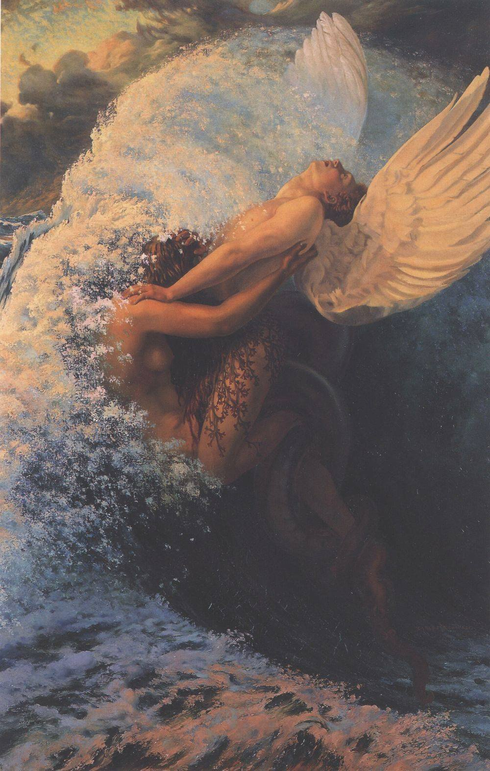 Pintura feita baseada no livro de Charles Baudelaire, Les Fleurs du mal (As flores do Mal) publicado em 1857.